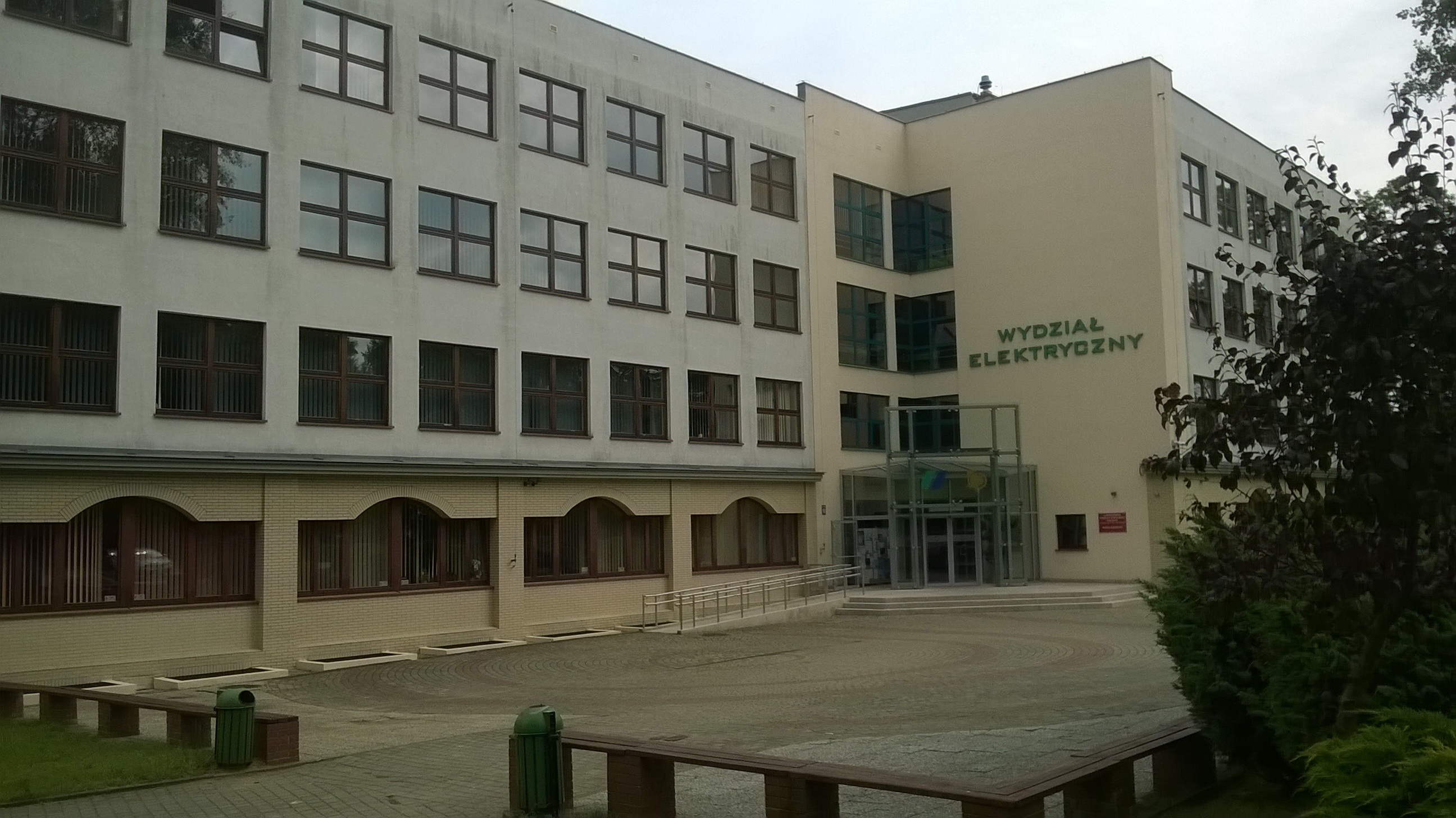 Wydz.Elektr.ZUT-ul.26-kwietnia-nr10-front1